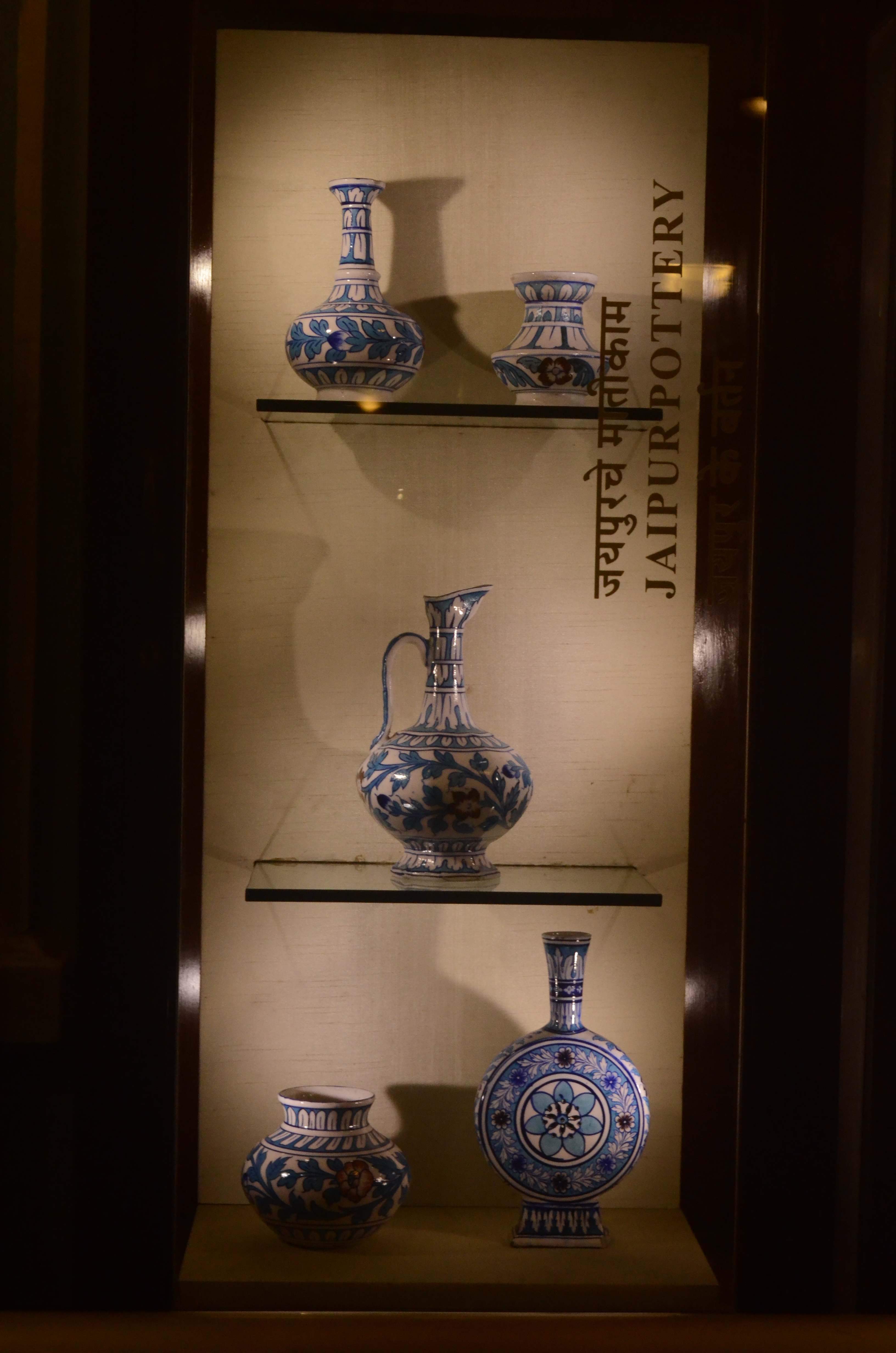 Images from Dr. Bhau Daji Lad Museum,Mumbai,Maharashtra. JAIPUR POTTERY.